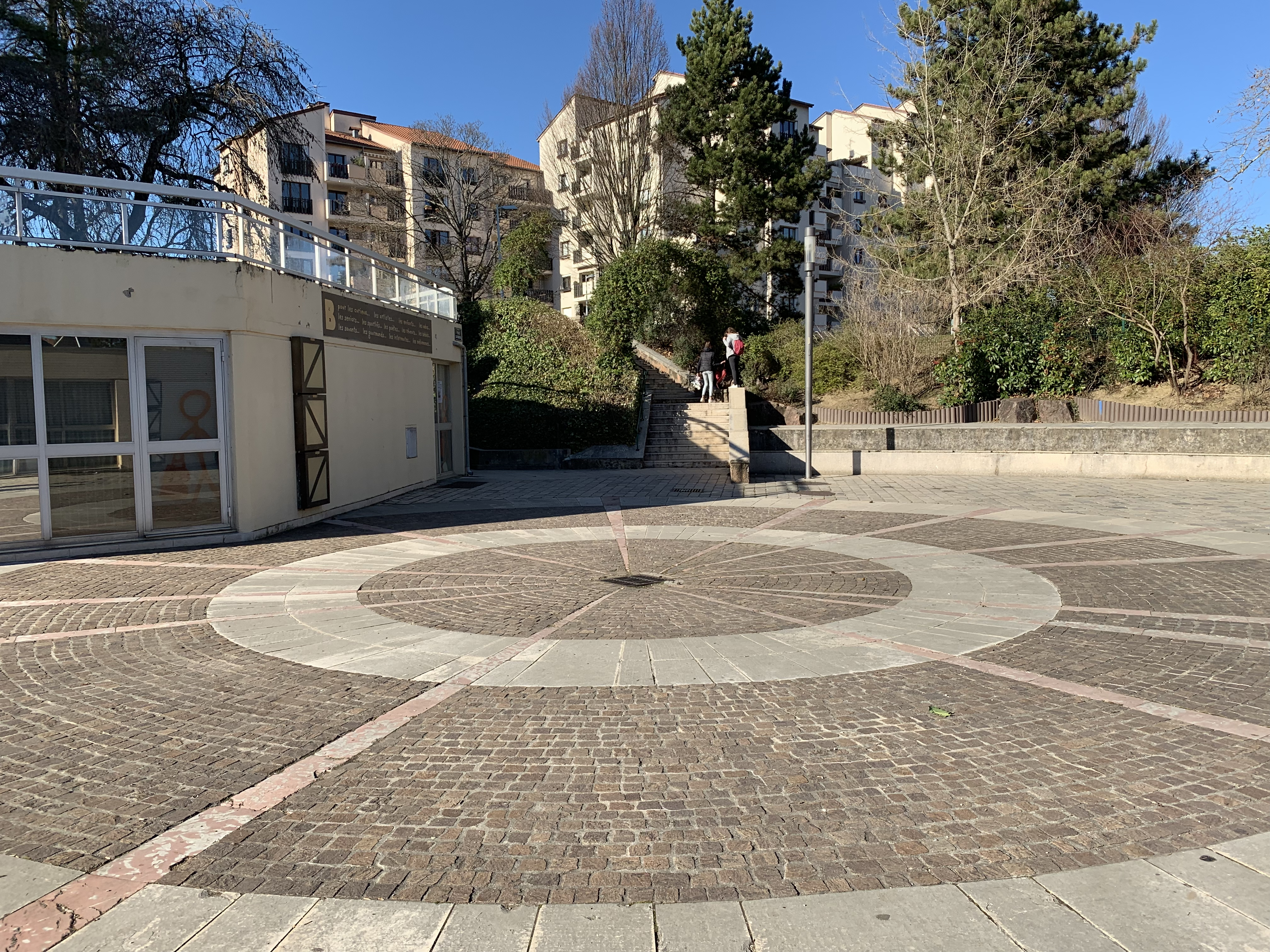 place Schönberg (Lyon).